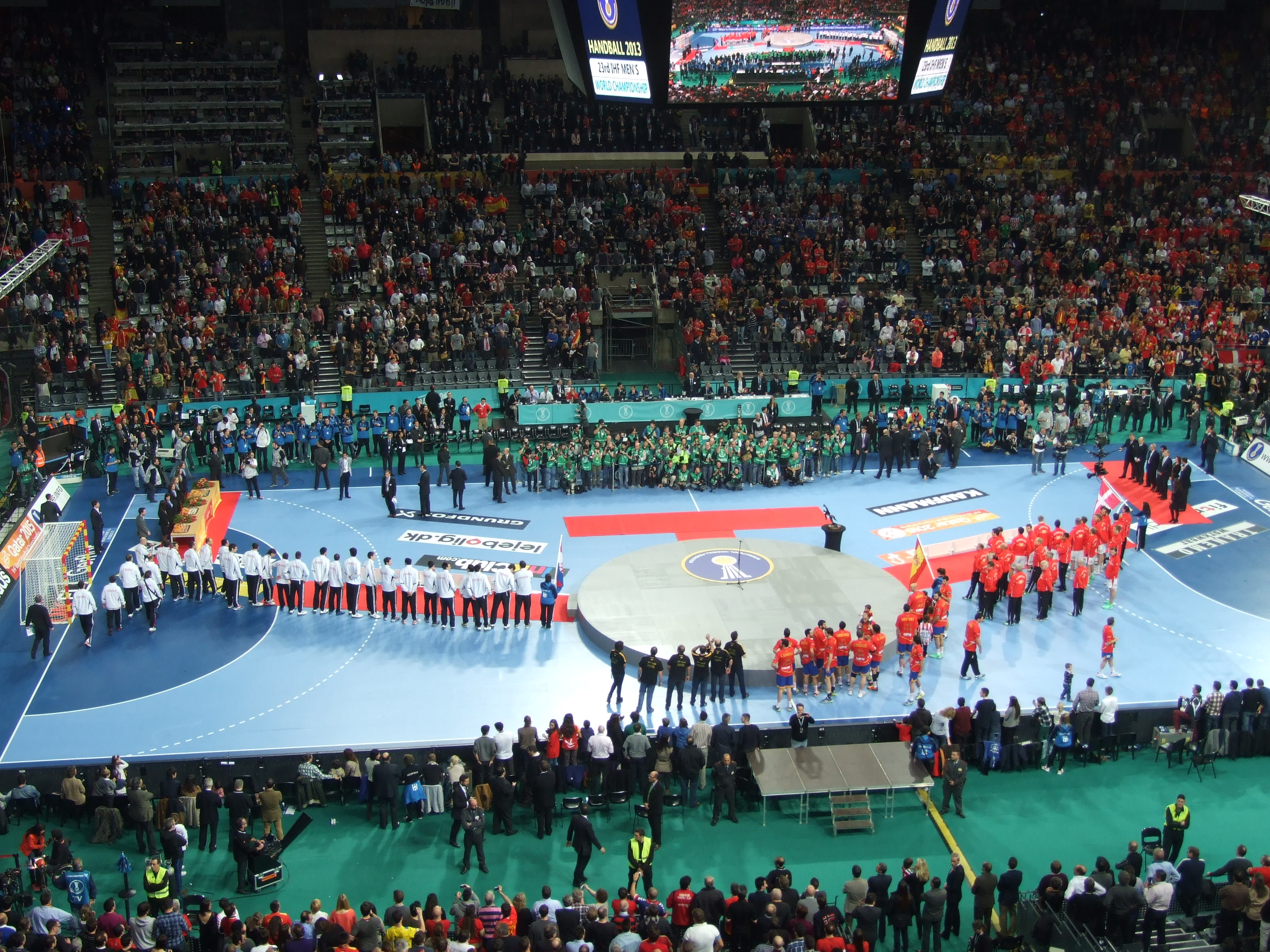 Entrega de medallas Campeonato del Mundo de balonmano 2013 - Palau San Jordi